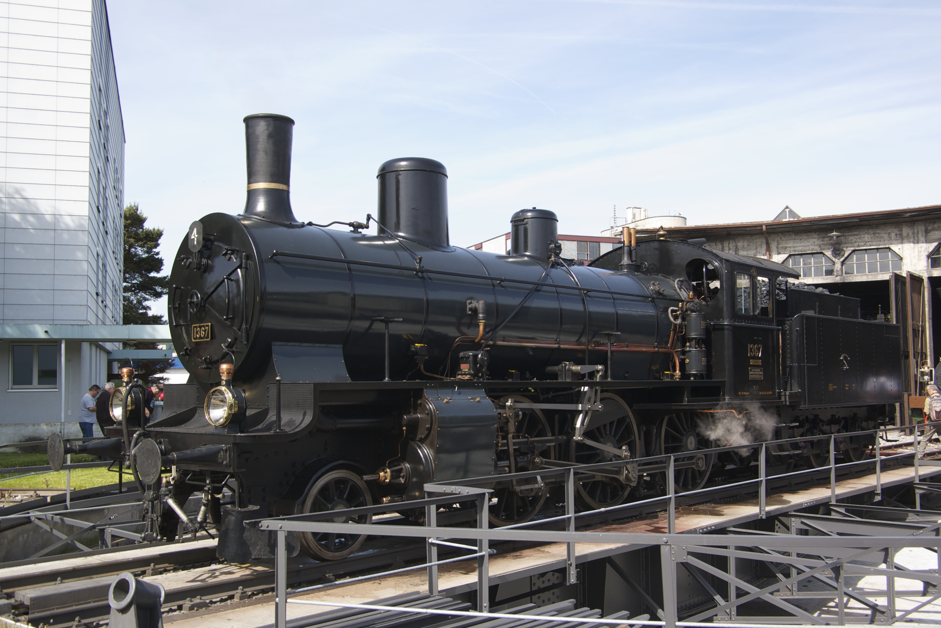 Dampflocomotive Nr. 1367 des Typs B 3/4 der Schweizeriſchen Bundesbahnen, gebaut 1916 iñ der Schweizeriſchen Locomotiv- und Machines-Fabrique zů Winterthur (Fabr.-Nr. 2557), 1964 außer Dienſt geſtellt und fürs Verkehrshaus der Schweiz reſervirt, 1978 betriebsfähig aufgearbeitet, 2001 an die Stiftung Historiſches Erbe der SBB; aufgnom̃en am 31. Mai 2015 im Fahrzeug-Dépôt zů Brugg.